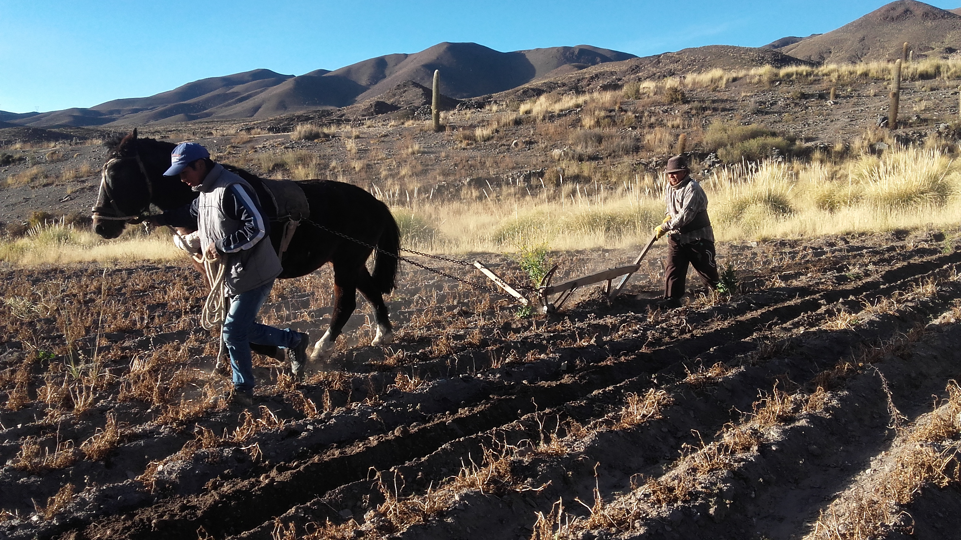 monumento cultural. Lugares